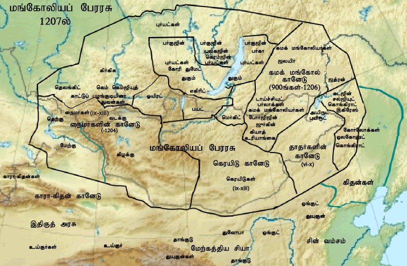 மங்கோலியப் பேரரசு 1207ல்